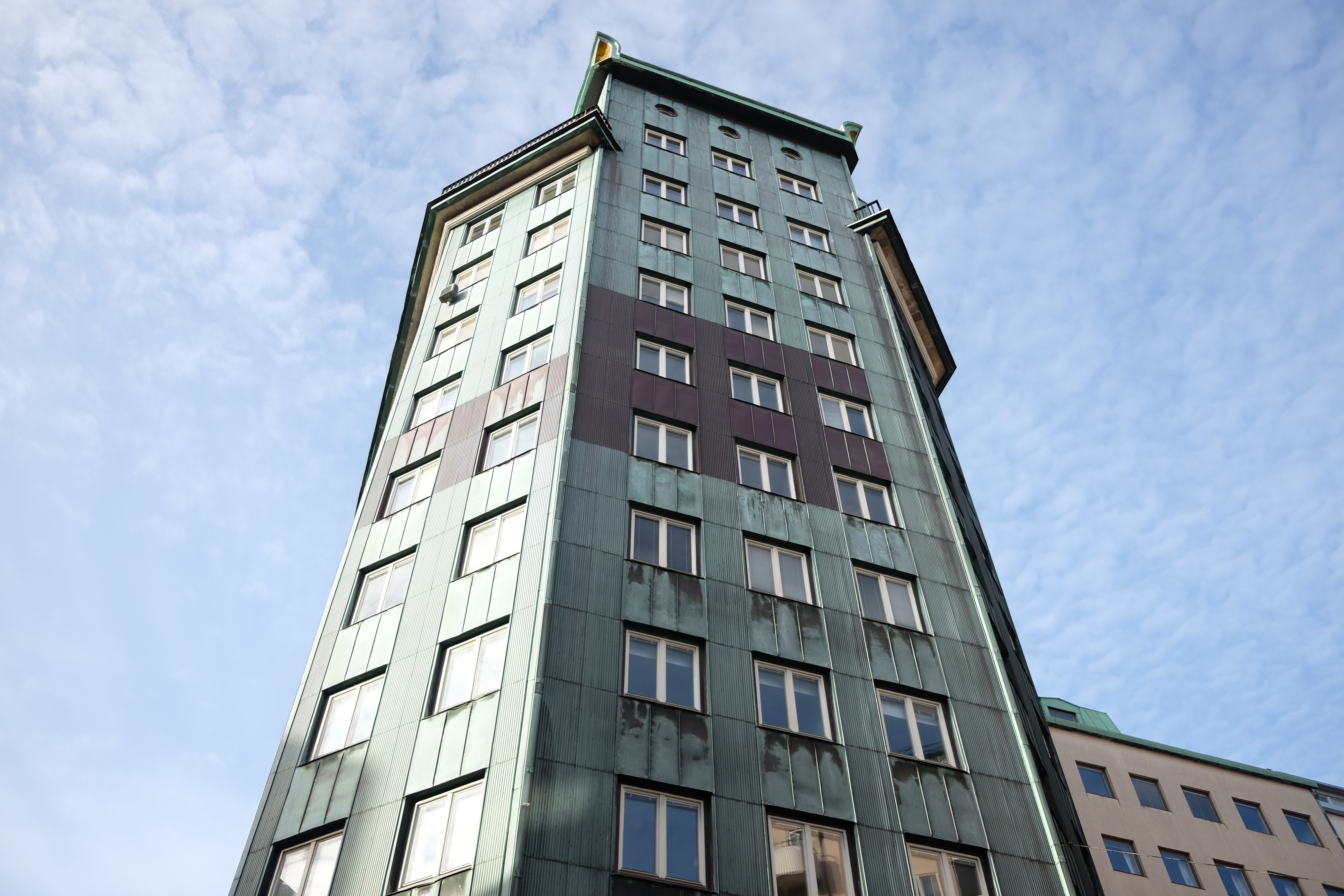 Otterhall, Inom Vallgraven, Göteborg.